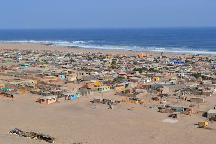 Panoramica del pueblo de Atico